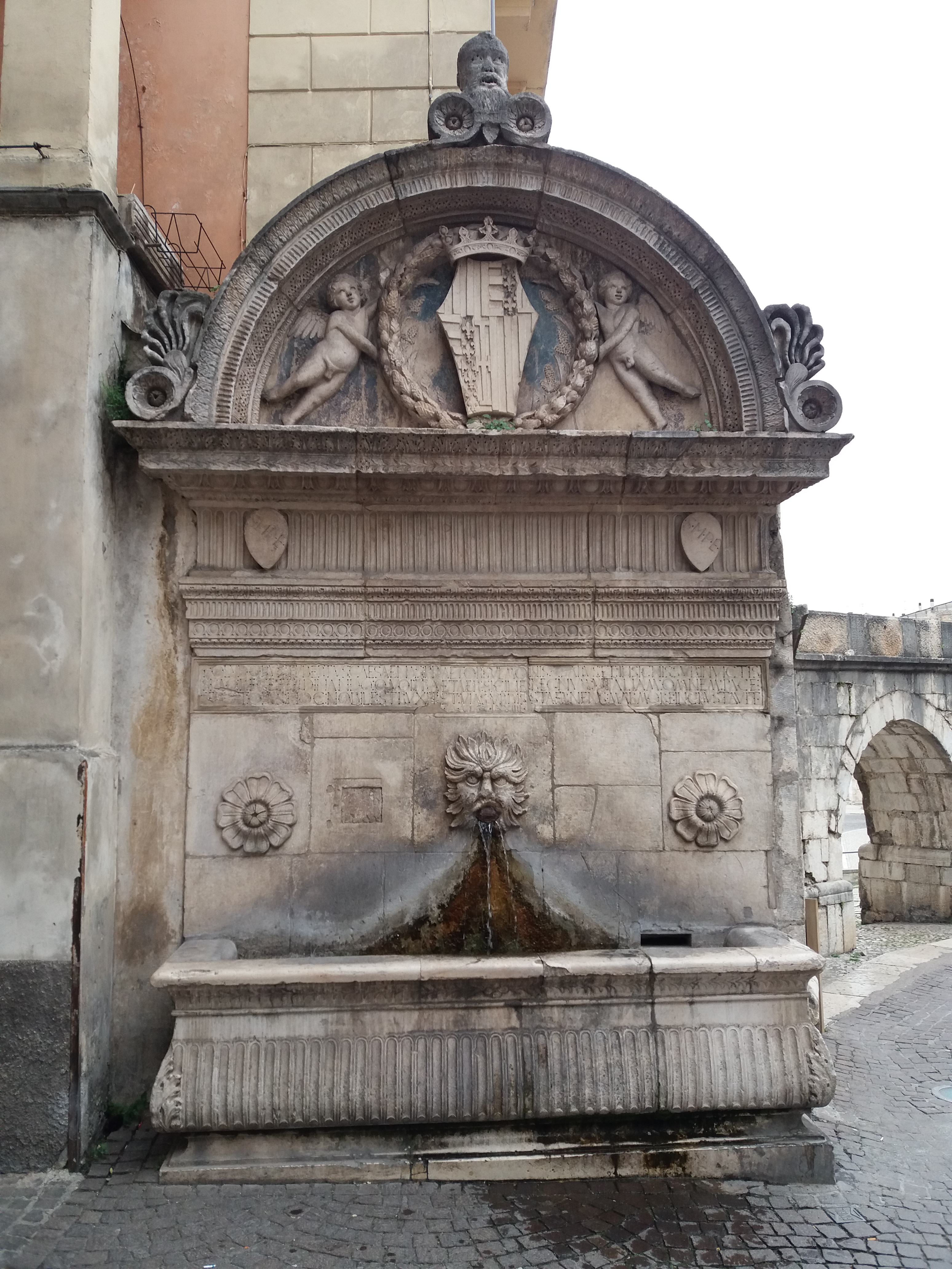 Sulmona: Fontana del Vecchio